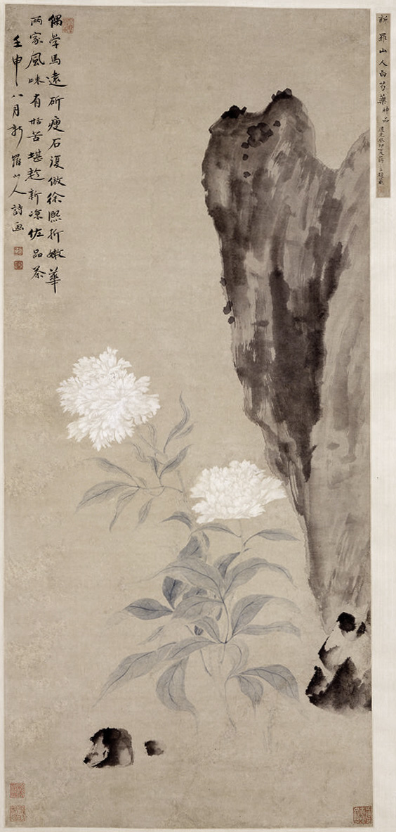 China; Hanging scroll; Paintings